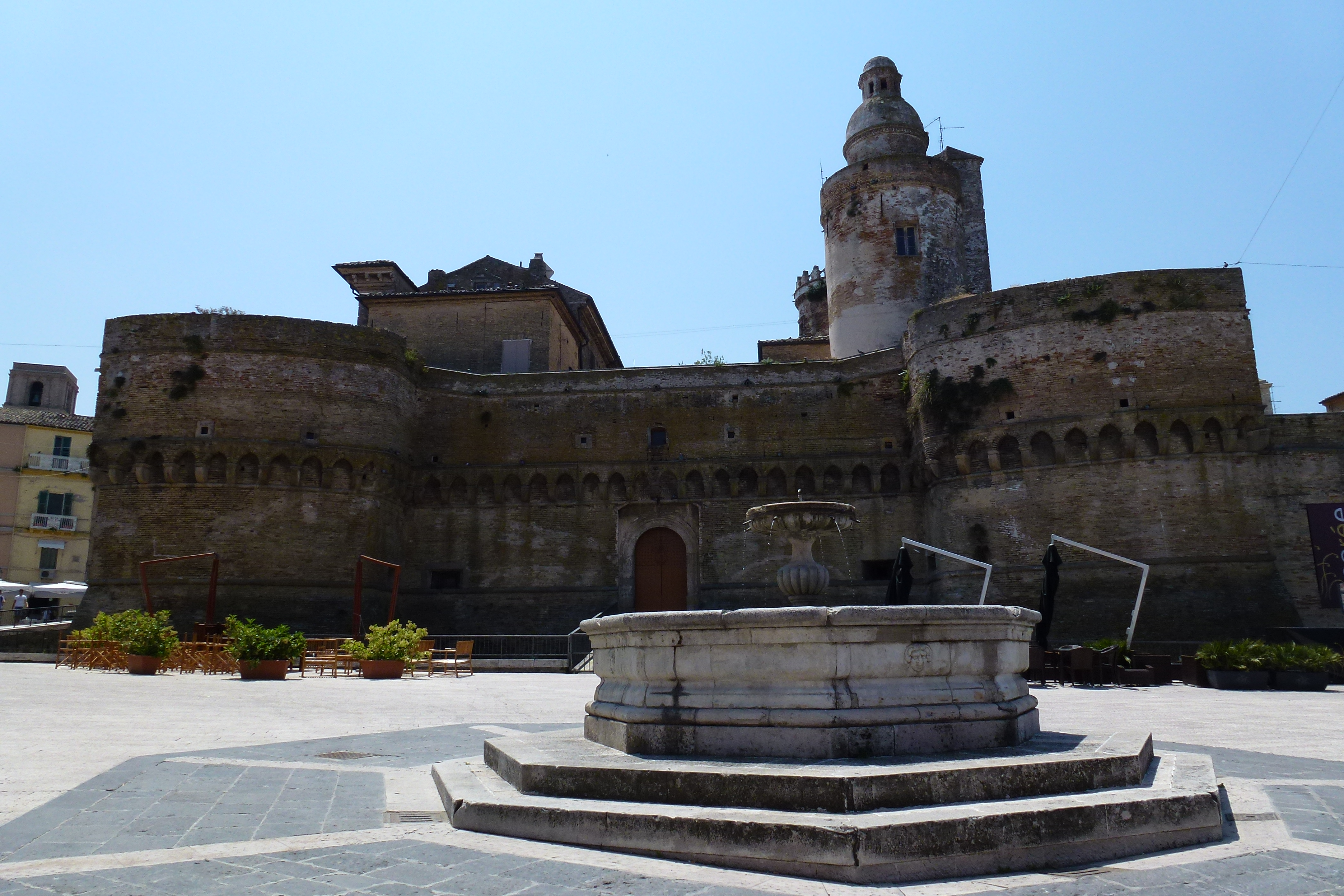 Vasto centro